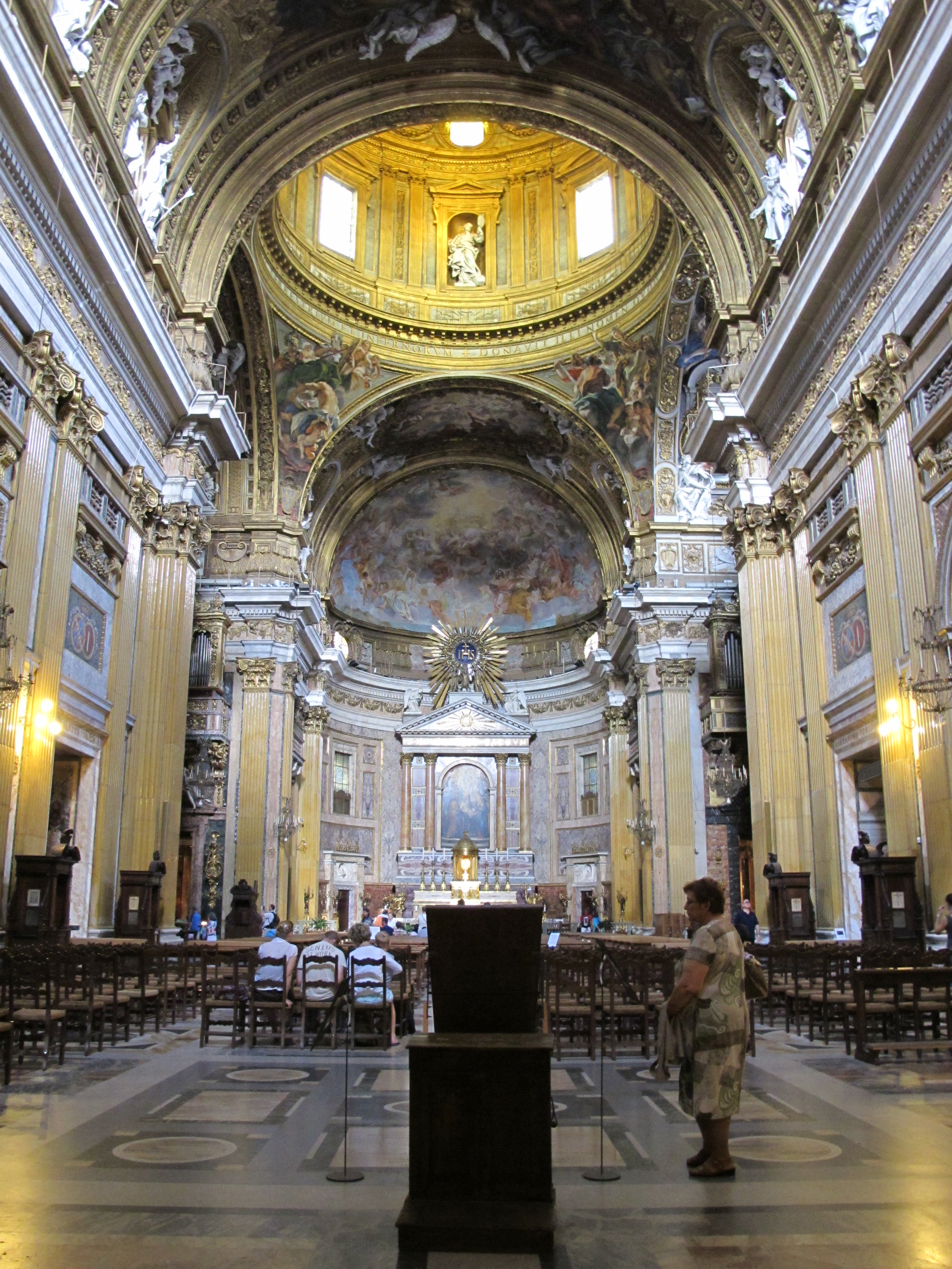 roma, la chiesa del gesù